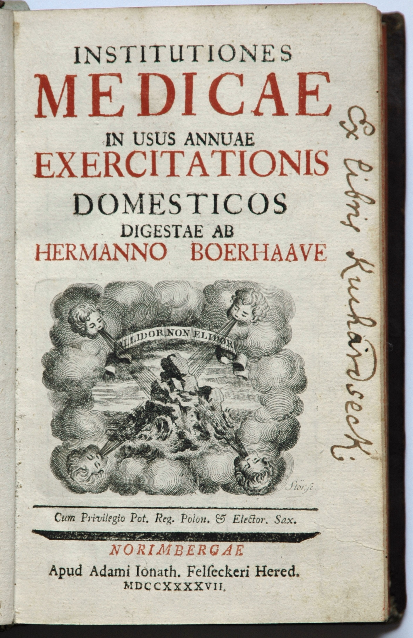 Boerhaaves Hauptwerk; Druck von 1797